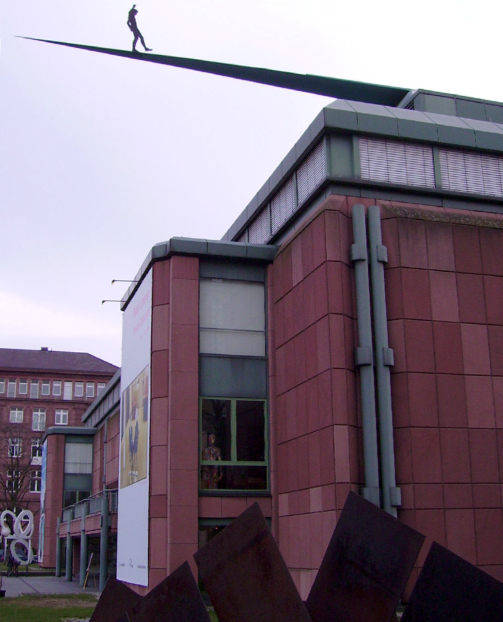 Kunsthalle Mannheim, mit Skulptur: Hubertus von der Goltz: Aus dem Nichts, 1992/93, Aluminium, farbig gefasst